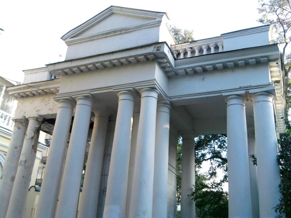 Вход в Ботанический сад имени А. В. Фомина